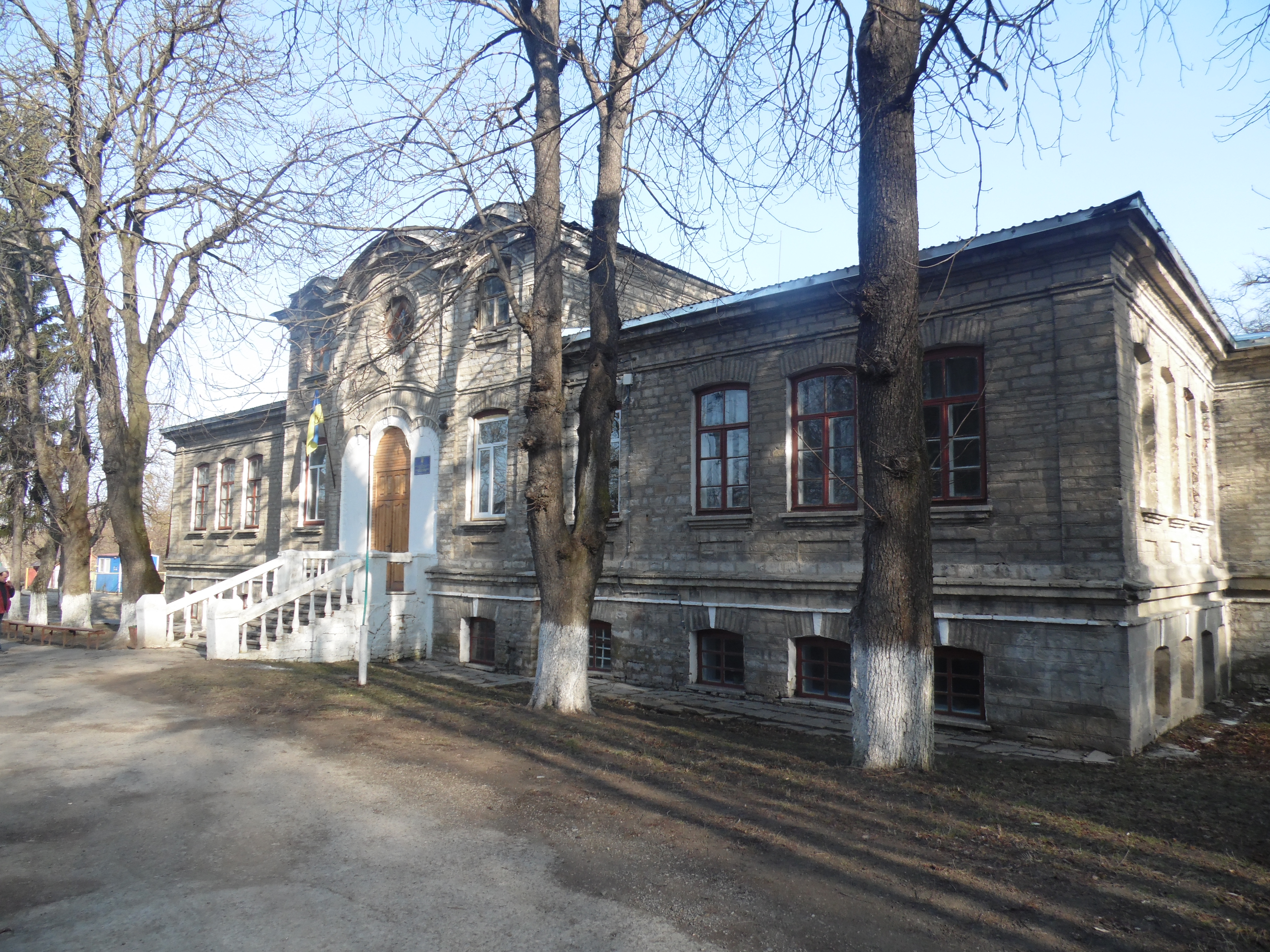 Маєток в селі Голосків Хмельницької області України. Вигляд спереду. Епоха Російської імперії.